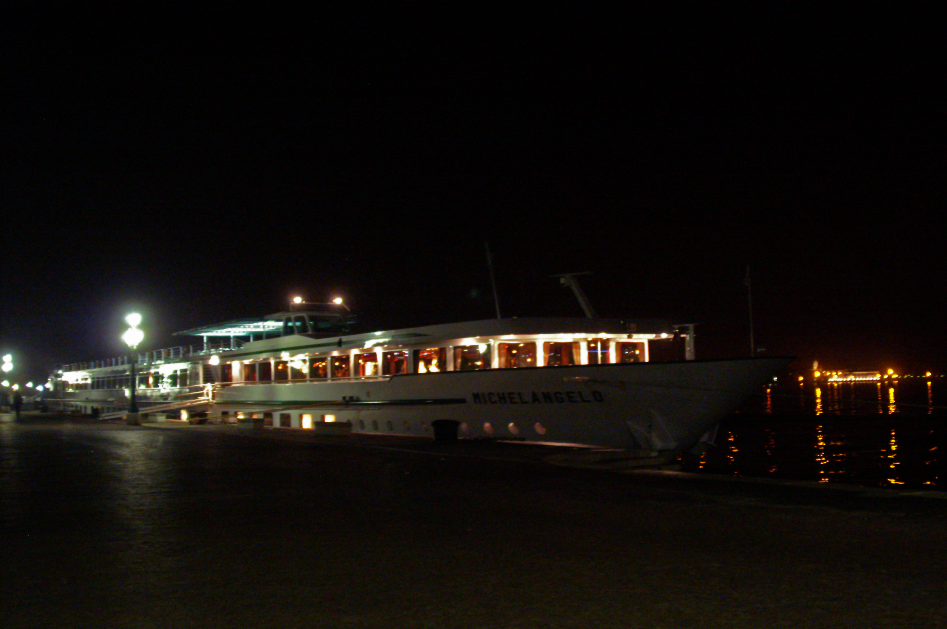 Michelangelo nachts am Anleger Riva dei Sette Martiri in Venedig